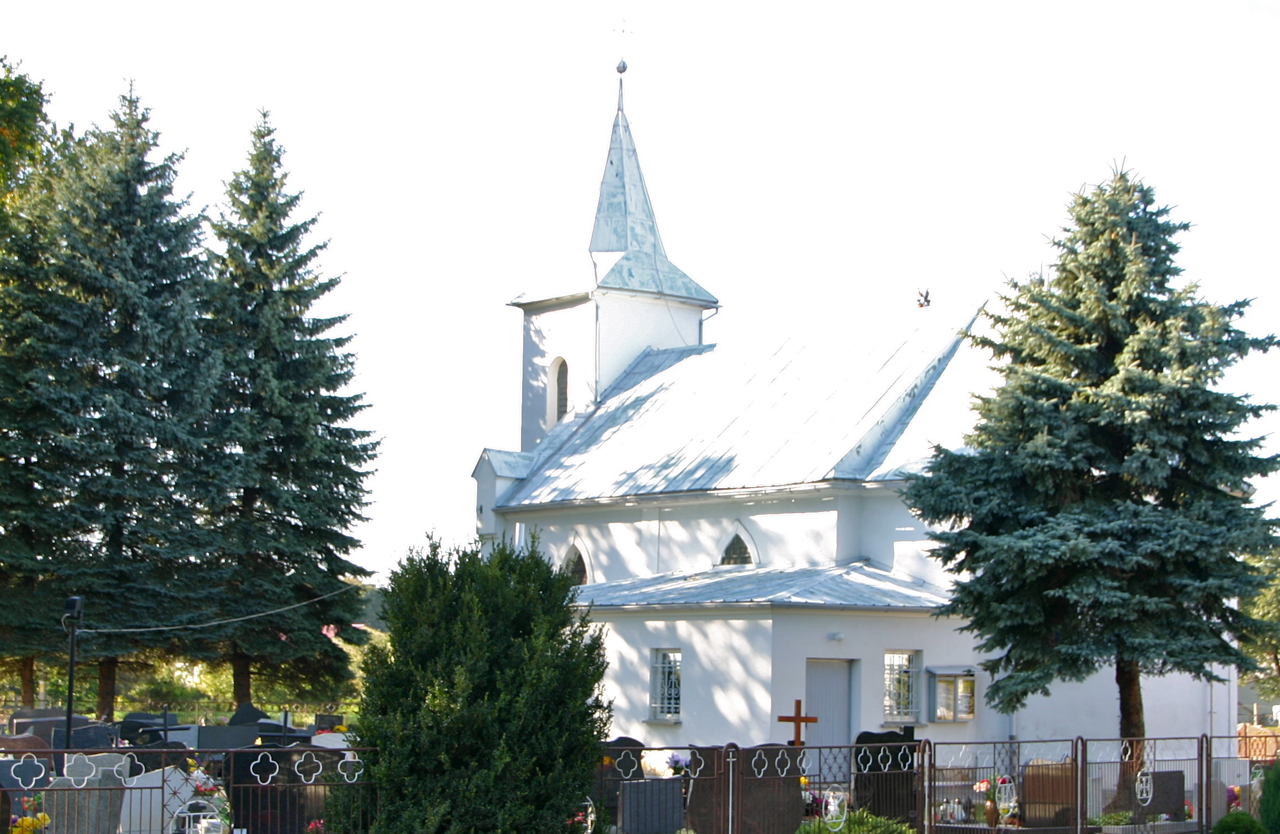 Trawniki – wieś w Polsce położona w województwie opolskim, w powiecie kędzierzyńsko-kozielskim, w gminie Pawłowiczki.